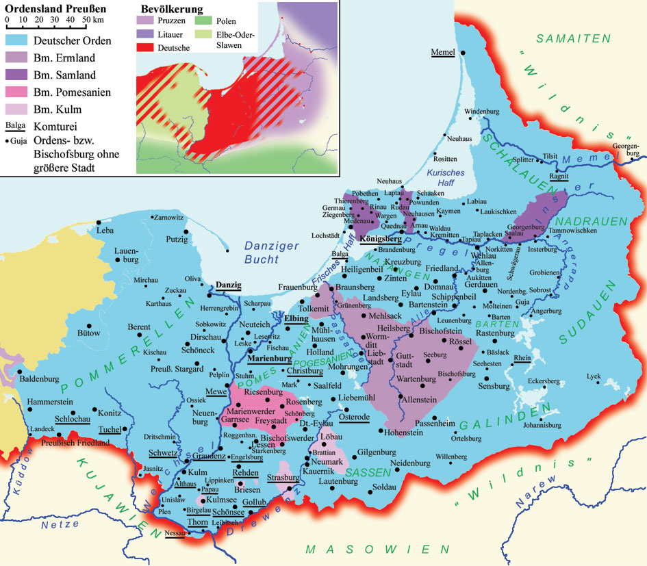 Staat des Deutschen Ordens Ordensland Preußen